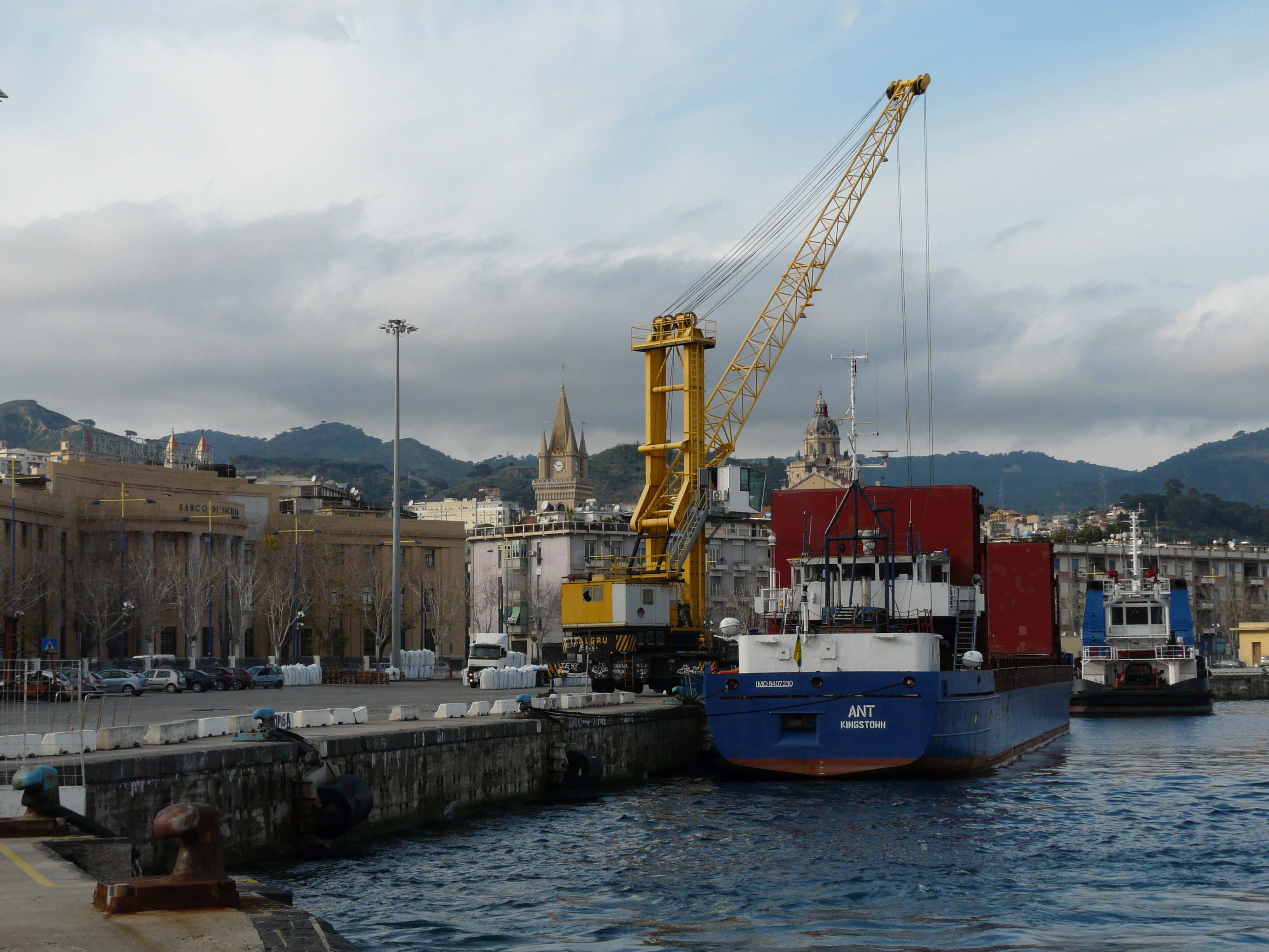 Судно "ANT" в порту Мессина.Unknown m/v "ant" alongside in messina port